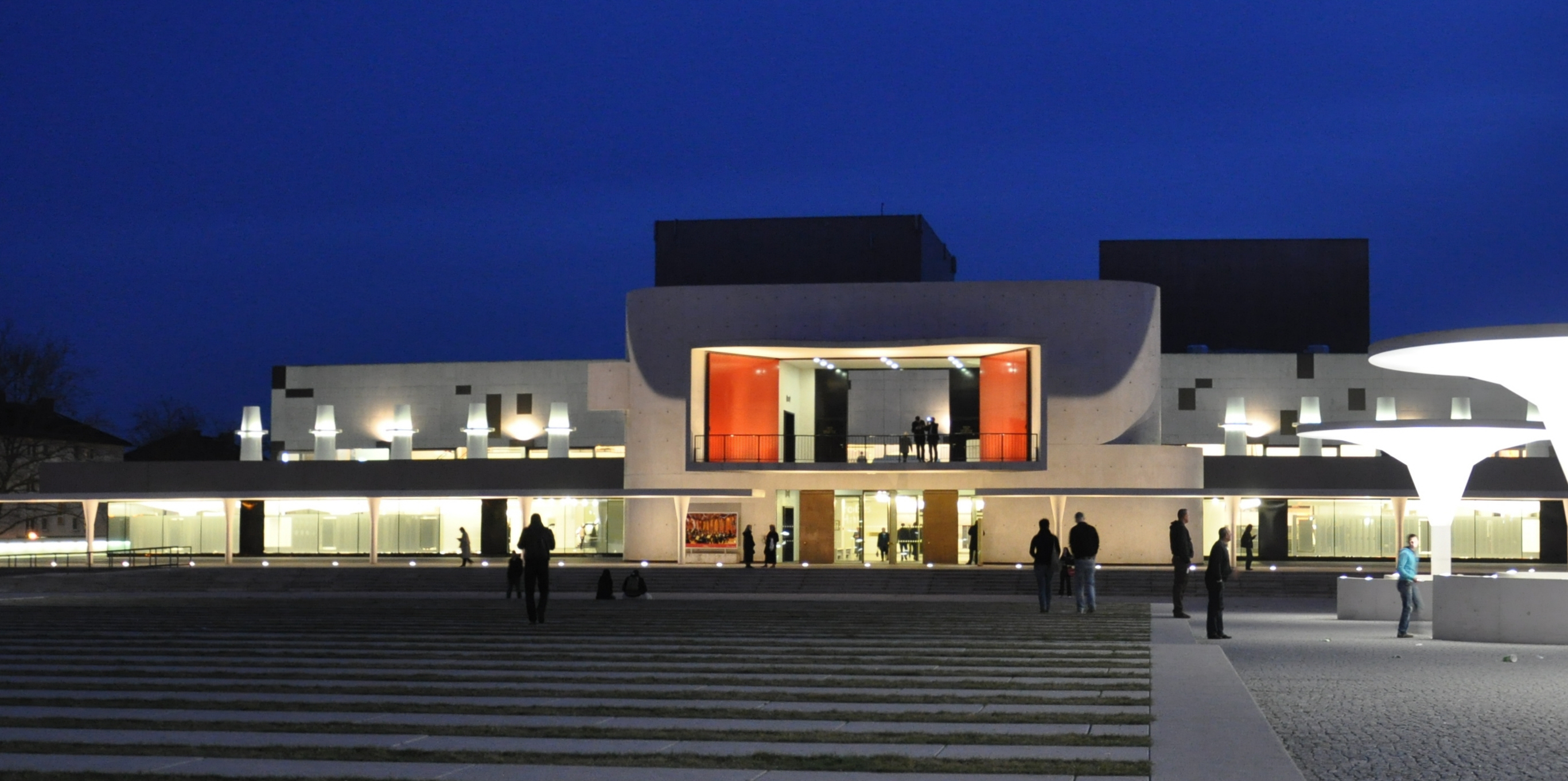 Darmstadt, Georg-Büchner-Platz Staatstheater Darmstadt